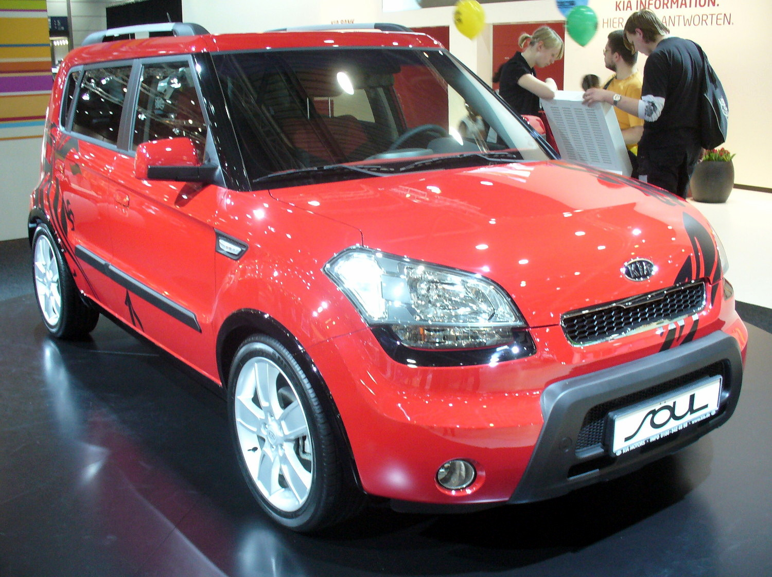 Kia Soul